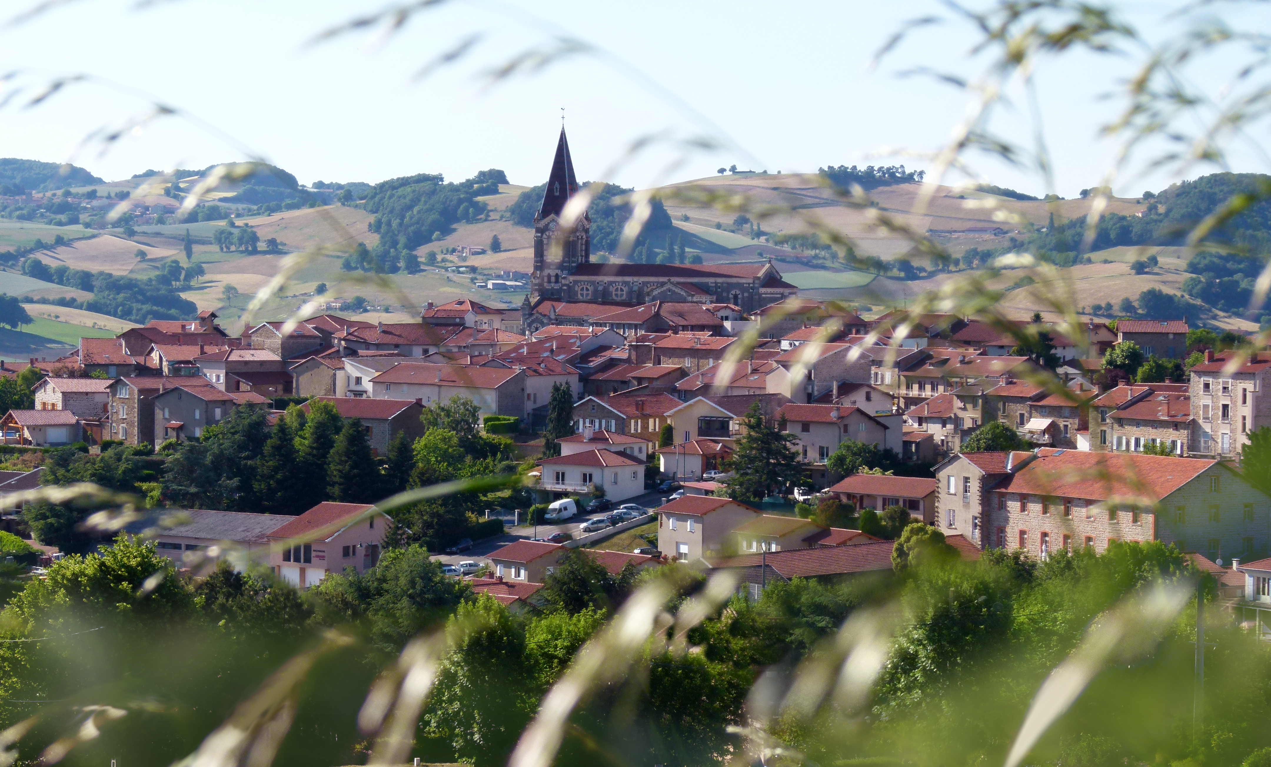 vue du village en mai 2011